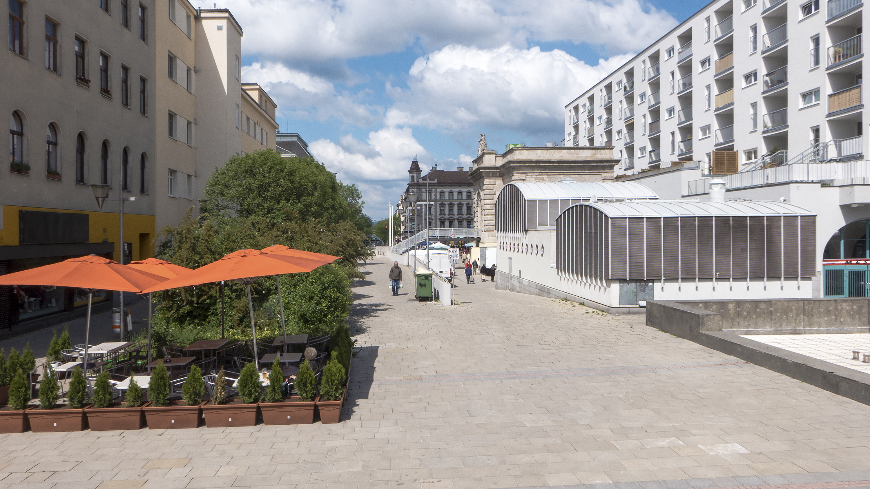 Meiselstraße in Wien 15 bei der Wurmsergasse Richtung Westen